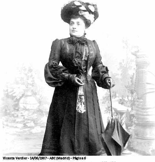 Retrato de Vicenta Verdier publicada en ABC, Madrid, el 14.6.1907 pag. 6